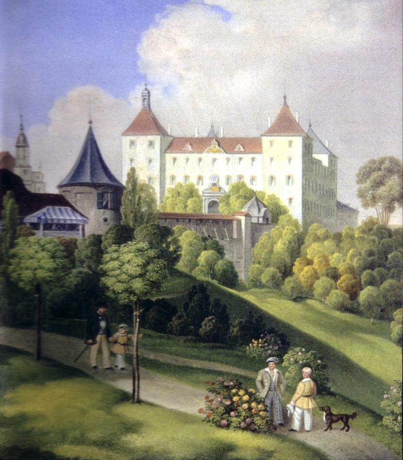 Wolfegg, Blick vom Schlossgarten auf das Schloss (Ausschnitt)